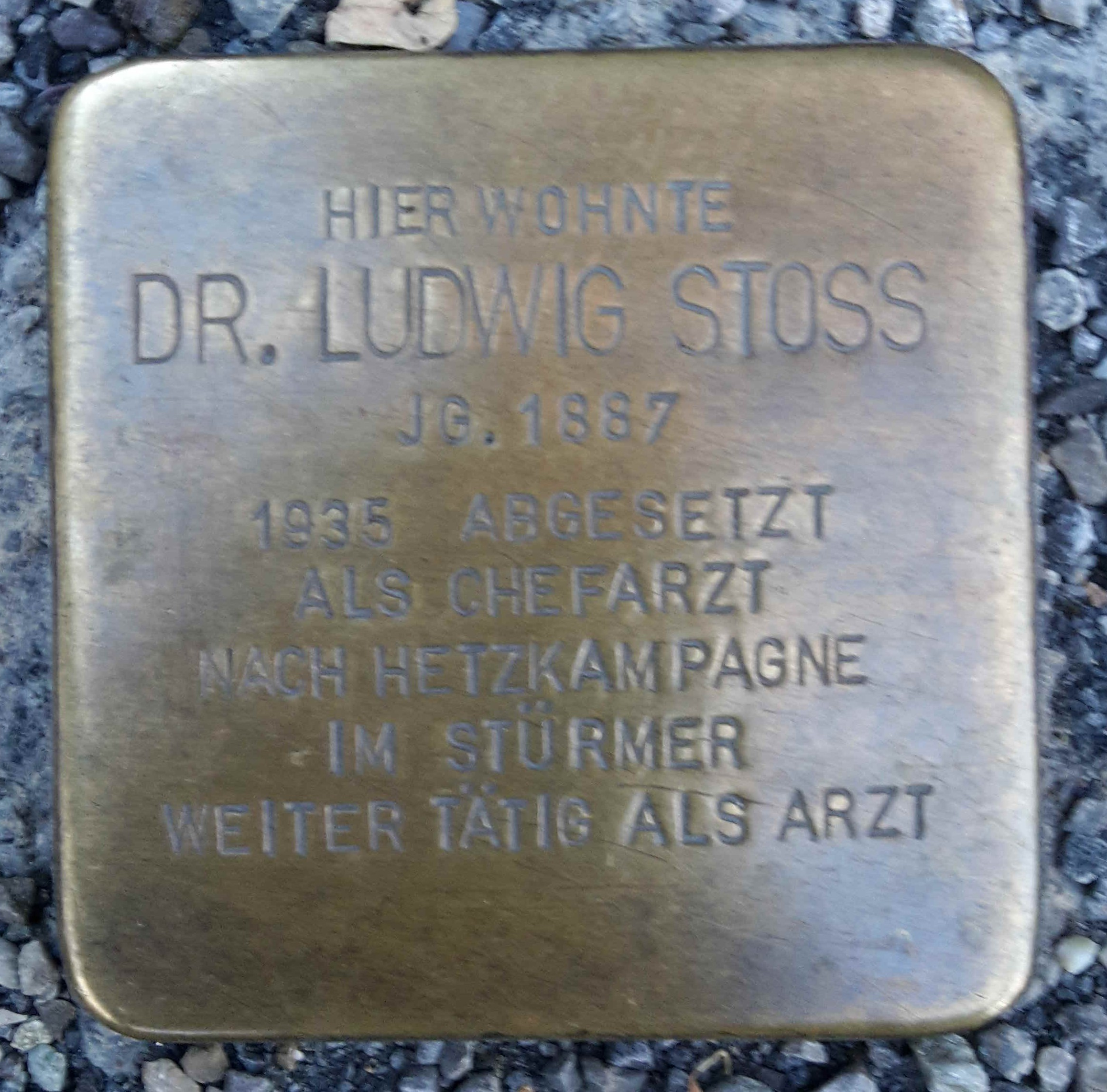 Stolperstein für Ludwig Stoss